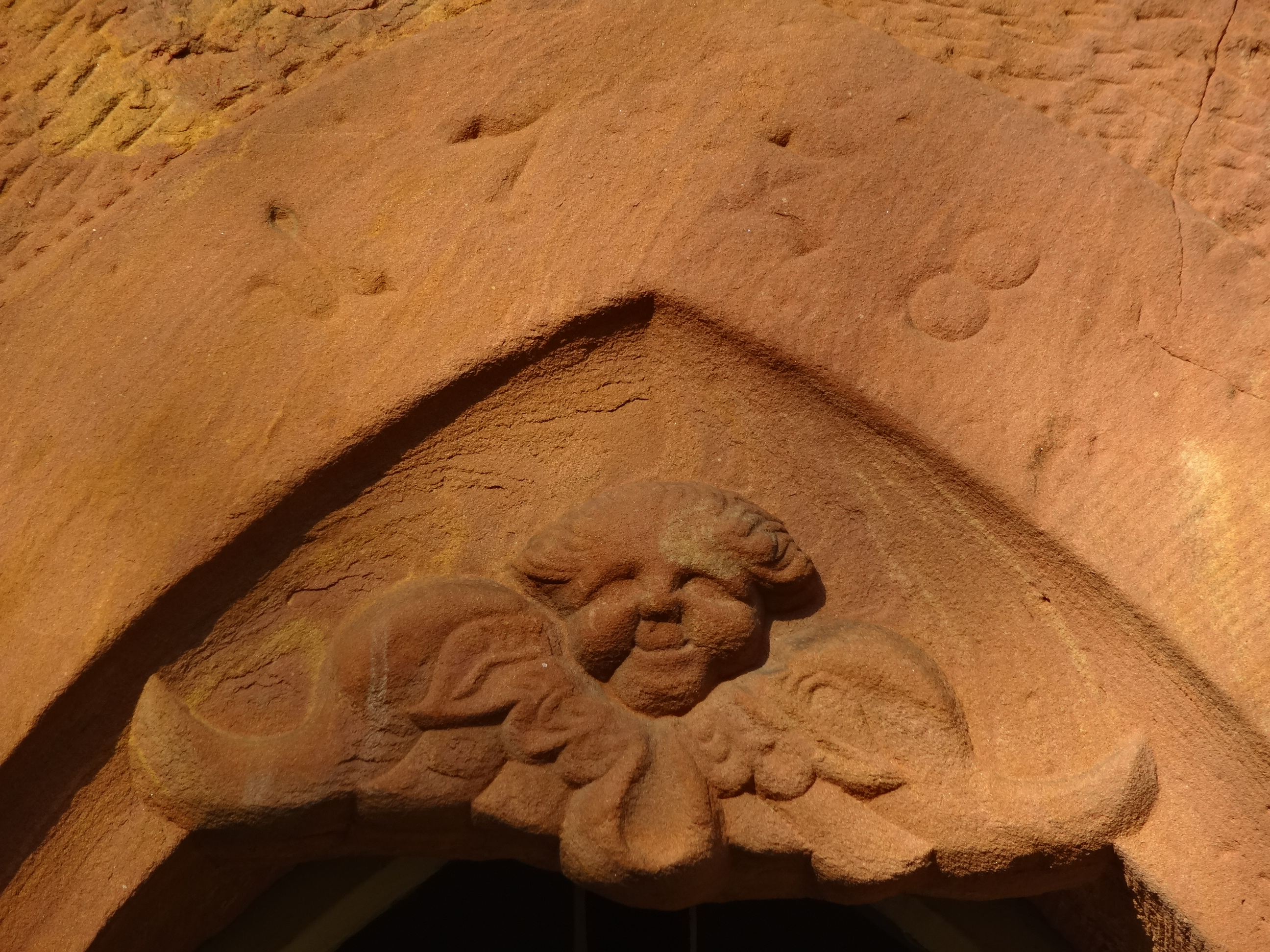 Evangelische Kirche Bauernheim